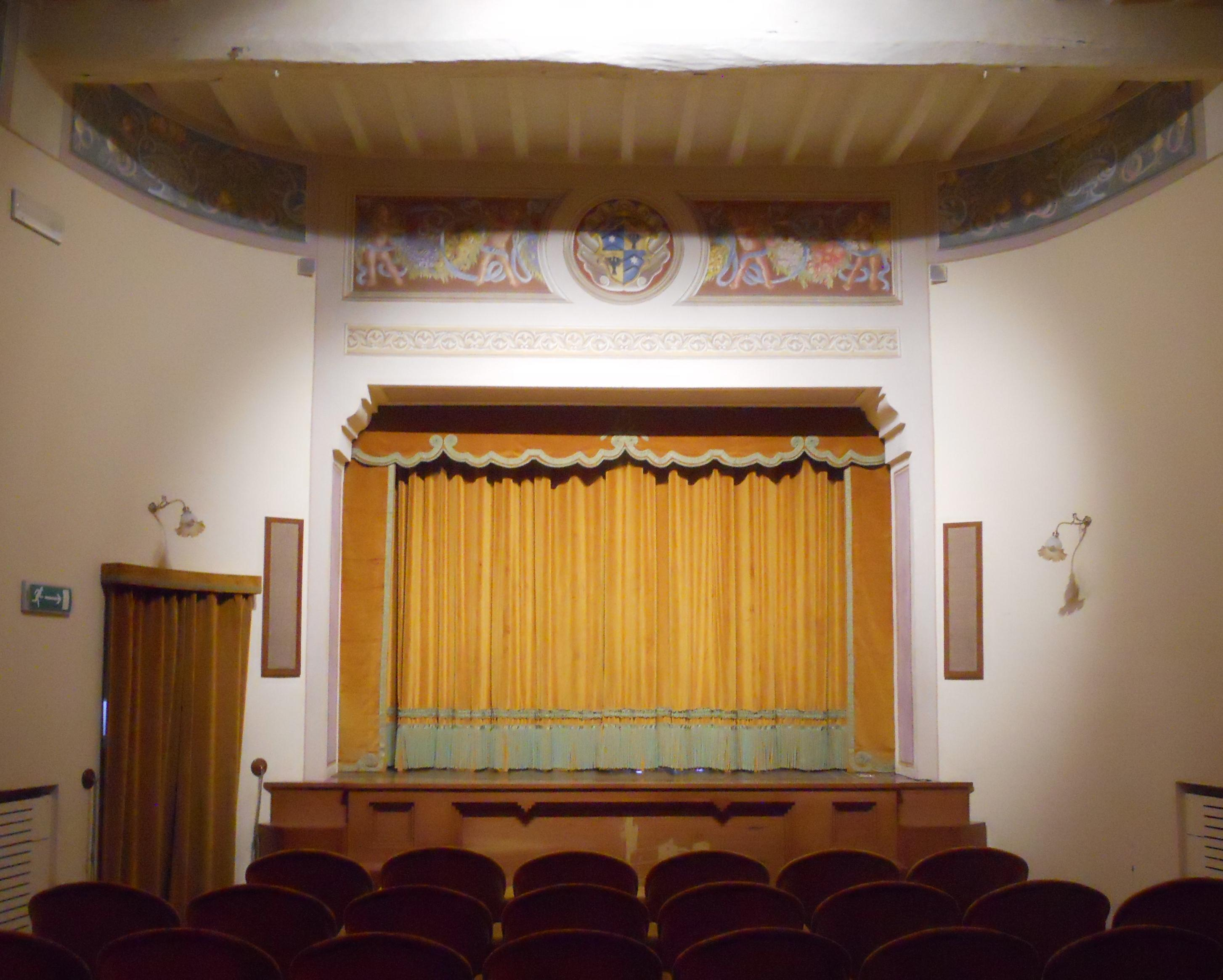 Fotografia dell'interno del Teatro della Grancia